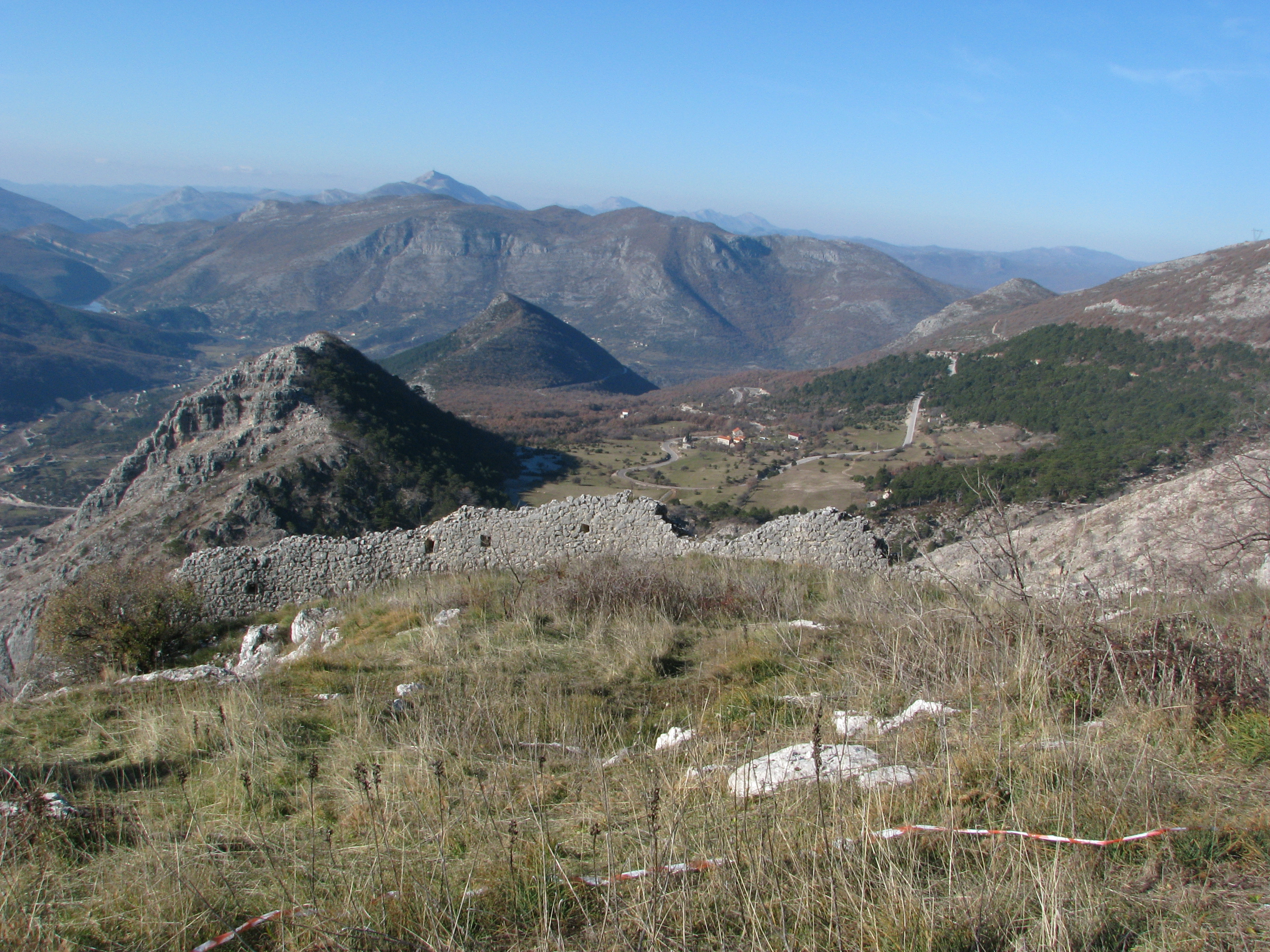 NKD648 Stari grad Klobuk, Klobuk. Ostaci starog grada Klobuka na granici između Trebinja i Nikšića.